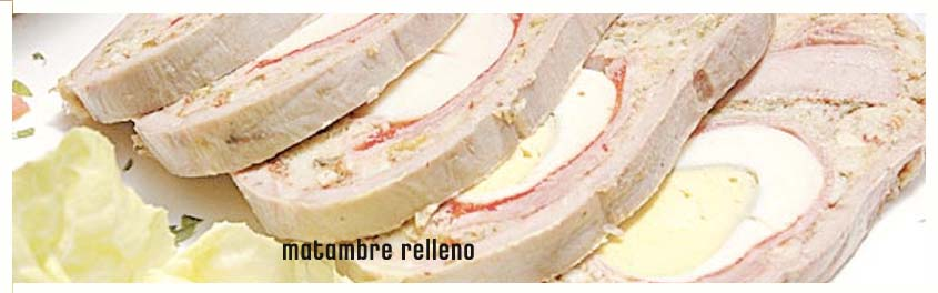 matambre relleno